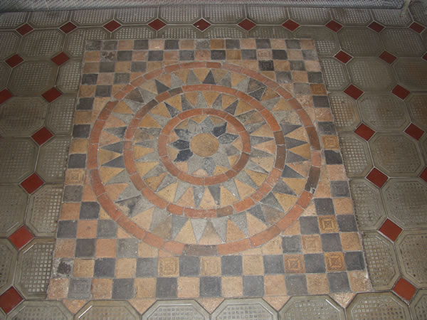 Bodenbelag ca. 1300